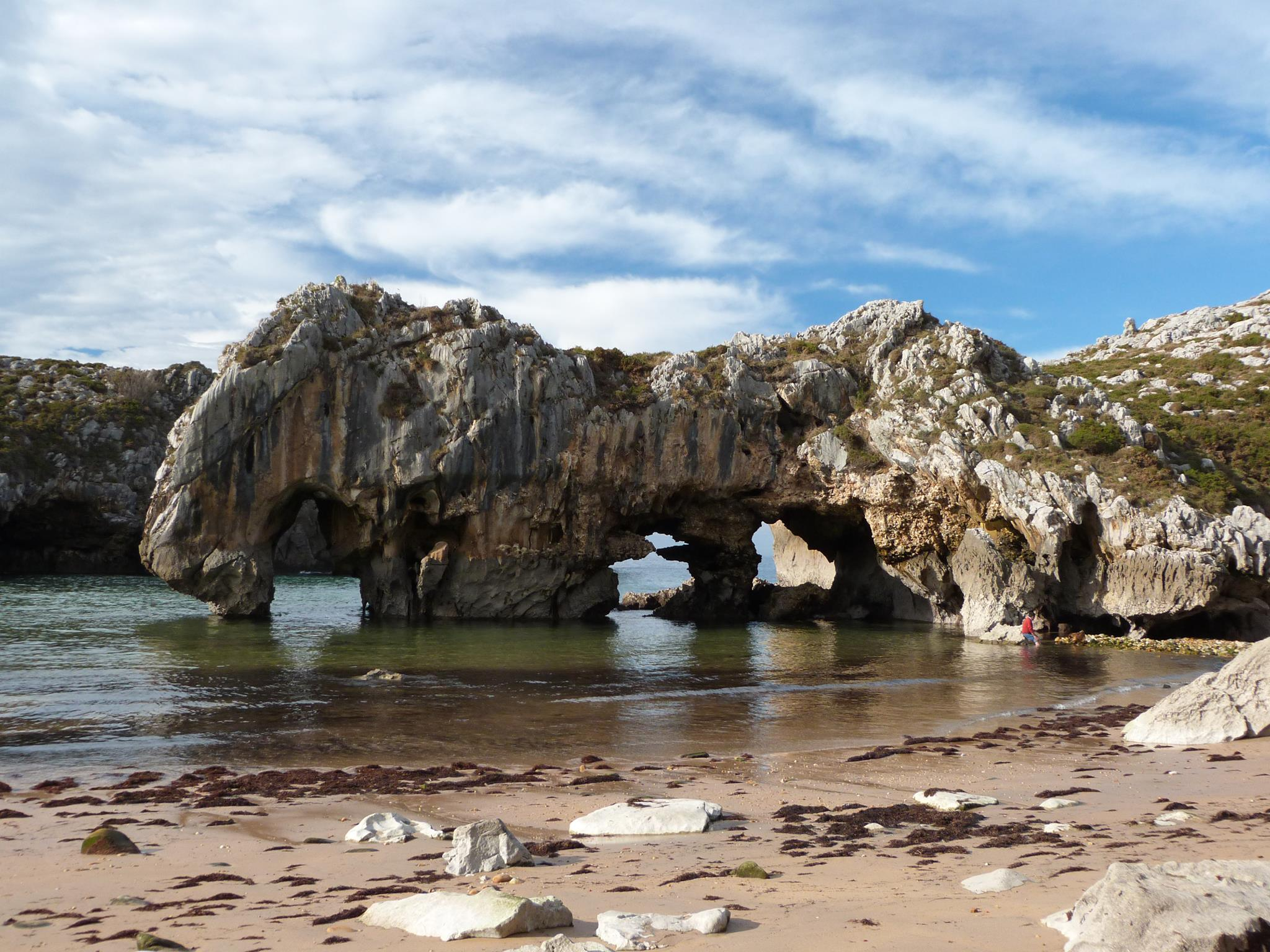 Fotografia cedida por Javier Carriles Sánchez